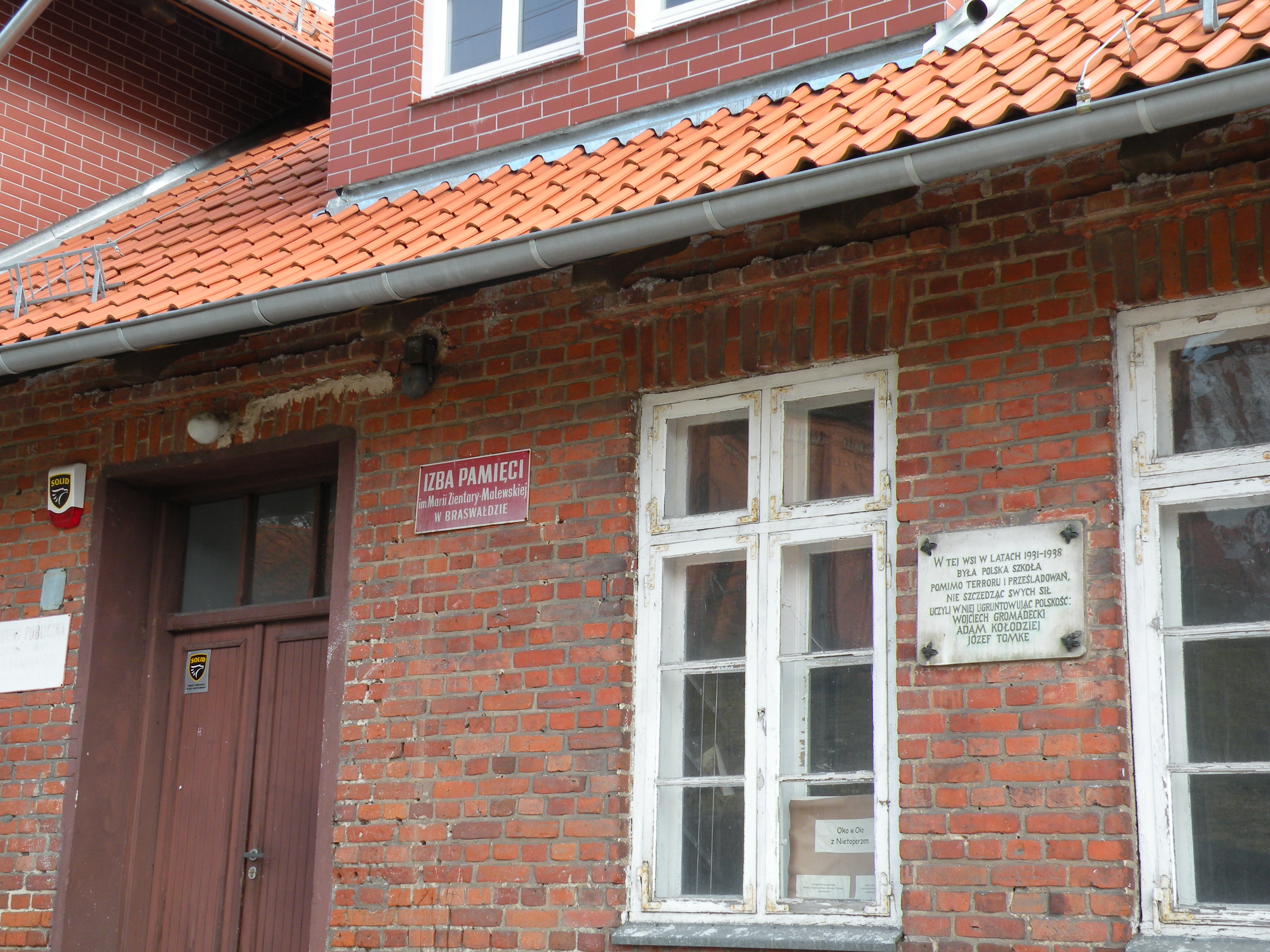 Brąswałd